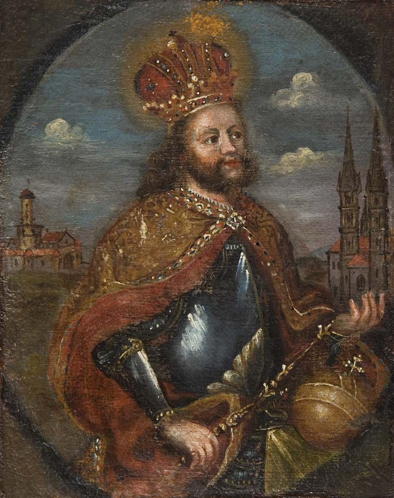 Kaiser Heinrich II.